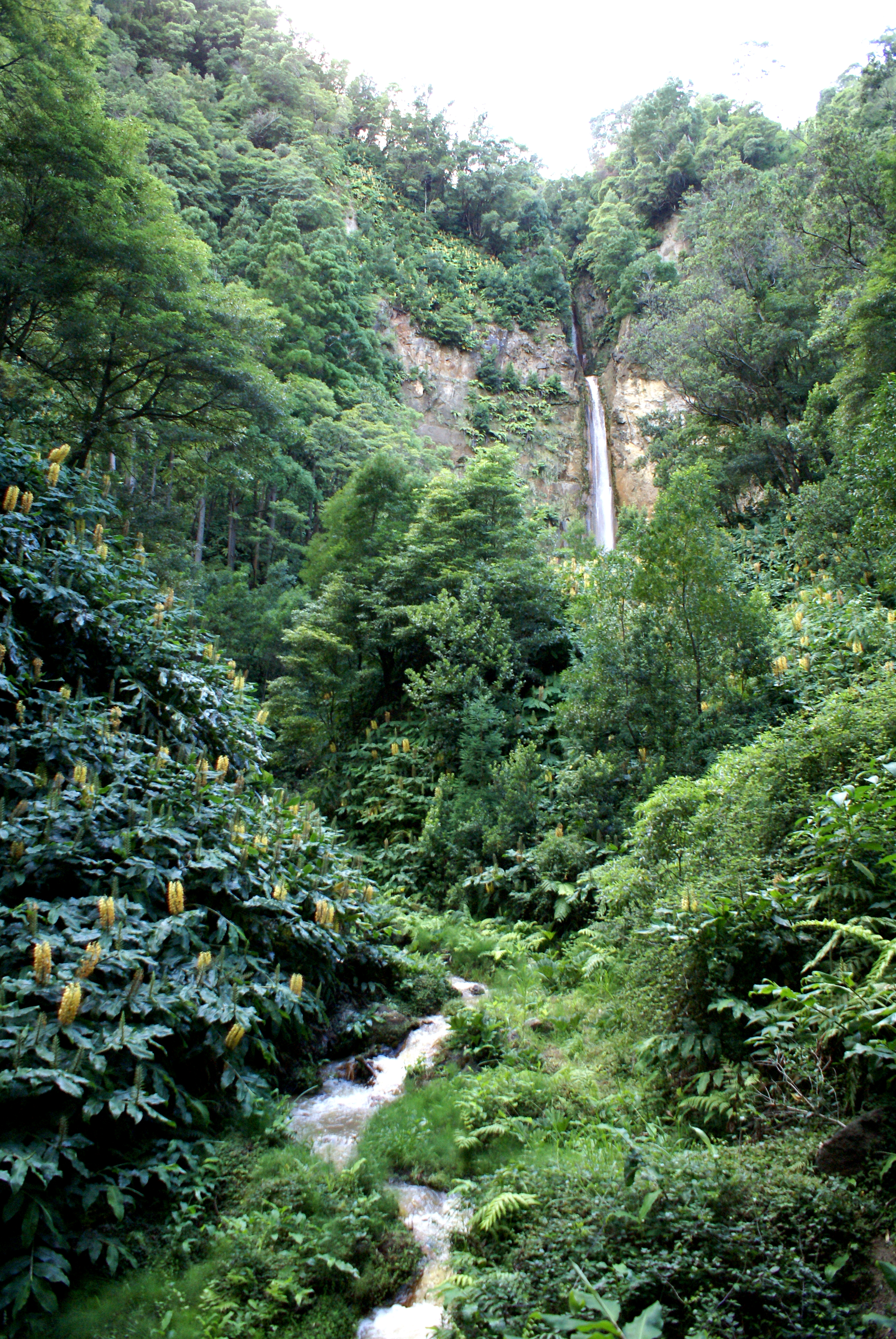 Paisagem envolvente as Cascatas, Ribeira Quente, ilha de São Miguel, Açores